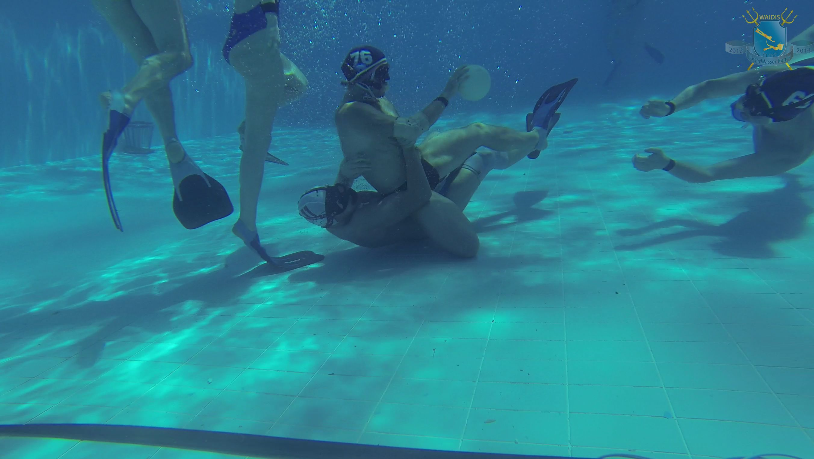 Unterwasser Rugby